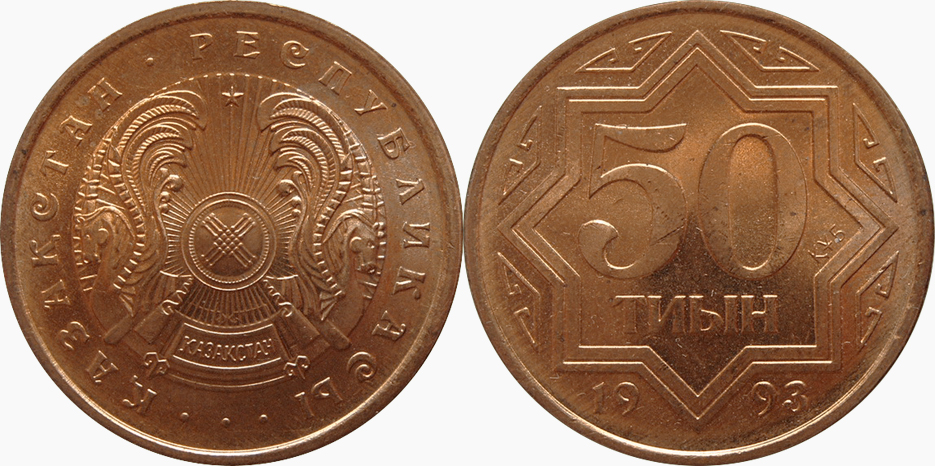 50 тиын 1993 года